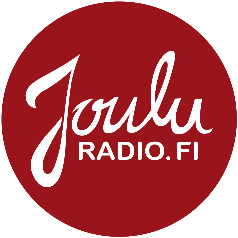 Jouluradion logo